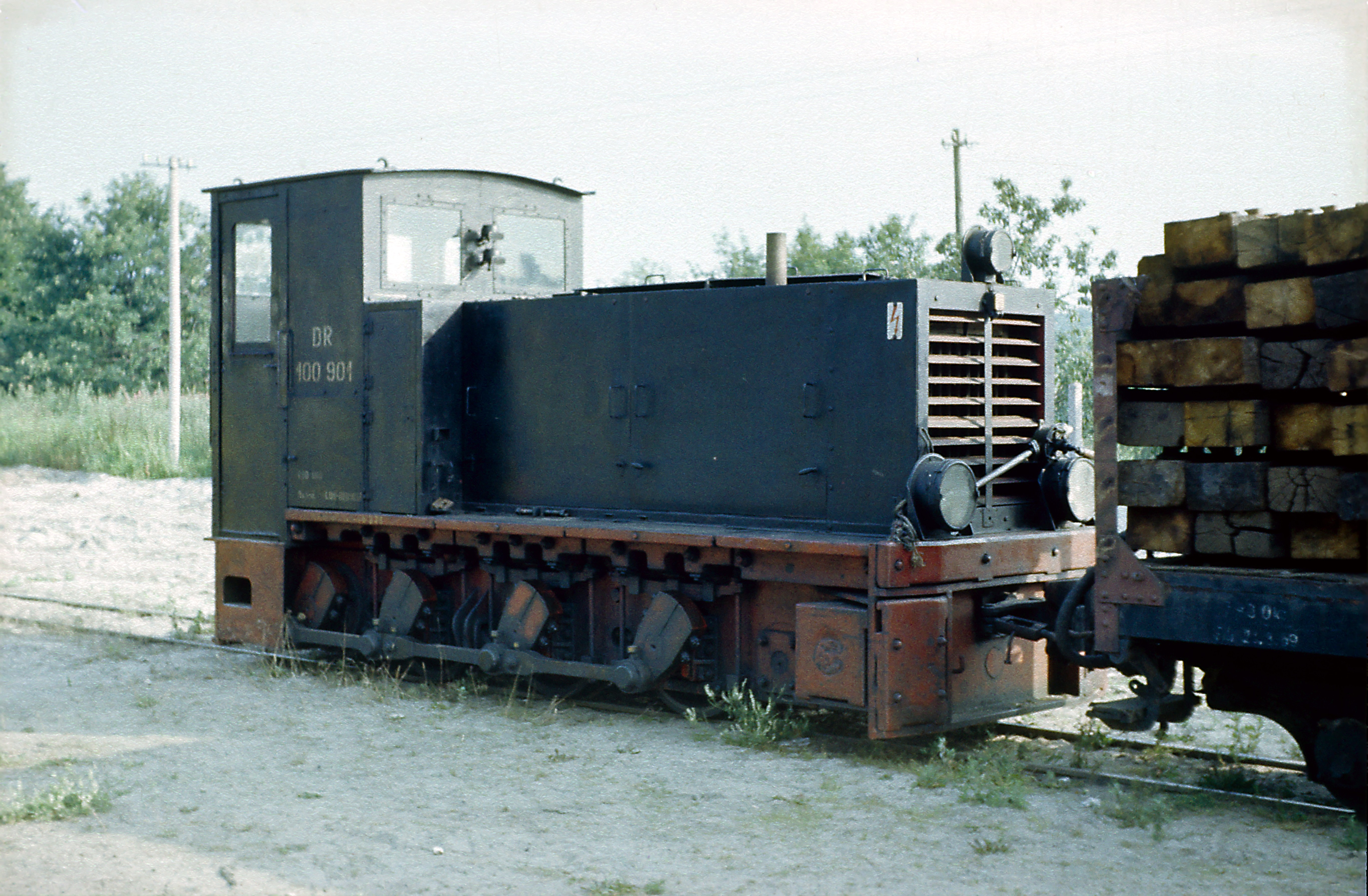 Vor 1970 hatte die Maschine die Betriebsnummer Kö 6001, zum Aufnahmezeitpunkt wird sie für Arbeitszüge bei der Oberbauereneuerung eingesetzt. Unklar ist, wieso die baugleiche 100 902 1973 in 199 002 umbezeichnet wurde, während die 100 901 ihre erste EDV-Nummer behielt. Ausgemustert und zerlegt wurde sie 1985. Die Lokomotive hat keine Druckluftausrüstung und deshalb an Stelle einer Fahrzeugpfeife zwei kfz-typische Hupen zwischen den Stirnwandfenstern. Eine Tankstelle gibt es hier nicht, deshalb liegt eine Fasspumpe vor dem Kühler zwischen den Loklaternen.